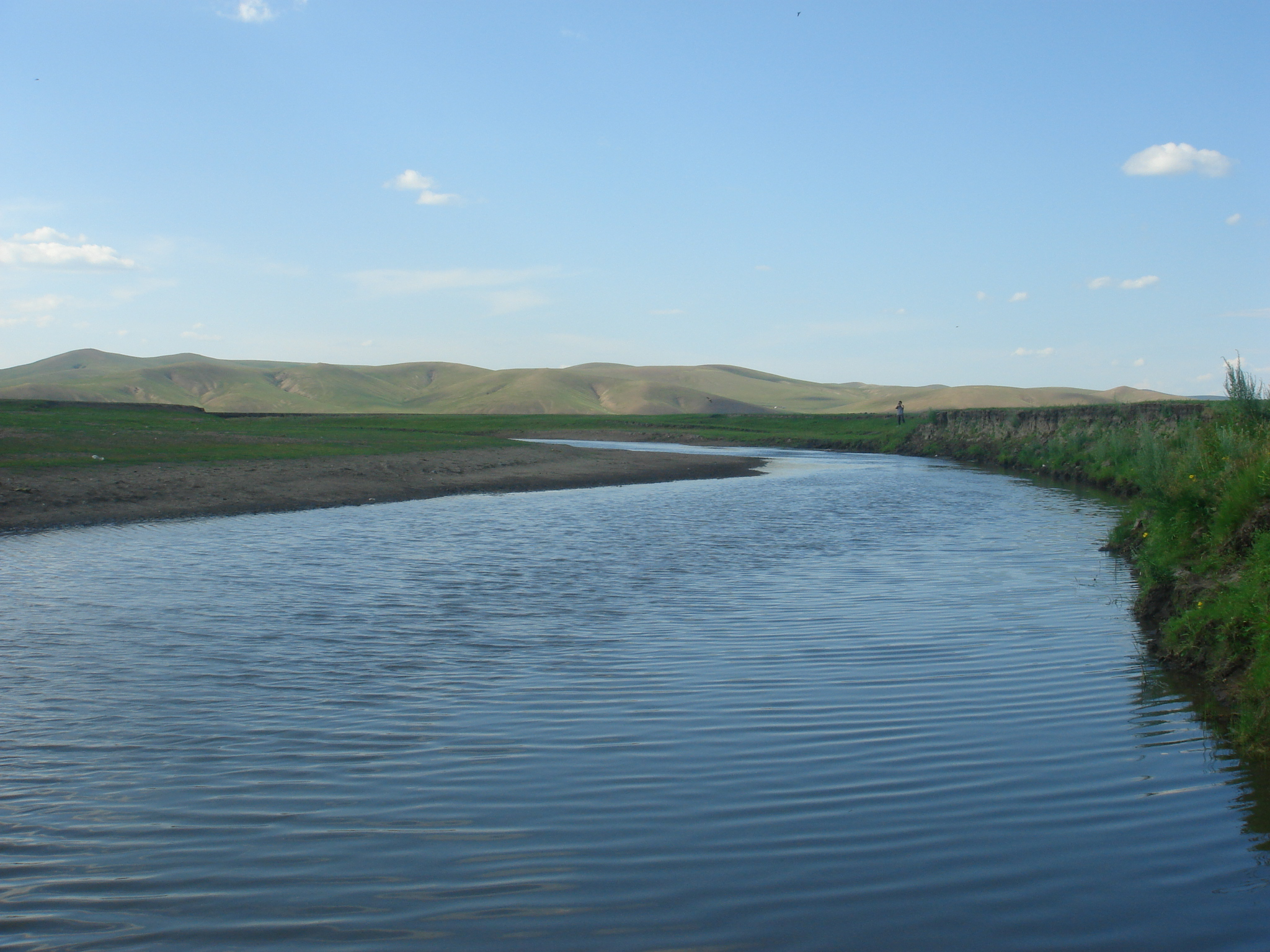 额尔古纳河 Argun River